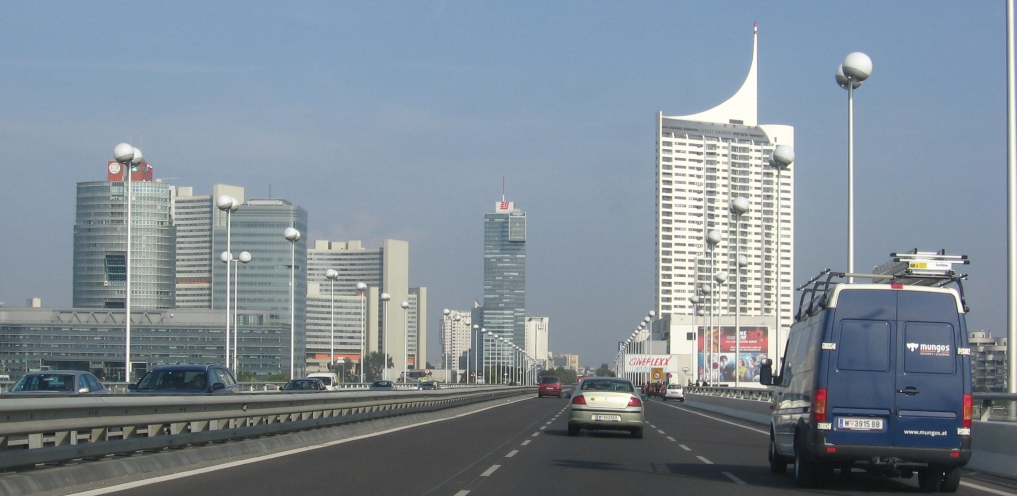 Reichsbrücke in Vienna, Austria; view from SW to NE.